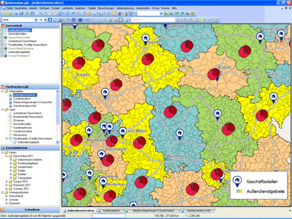 Frame 1 des aminierten GIFs File:RegioGraph 12 Bildschirm.gif